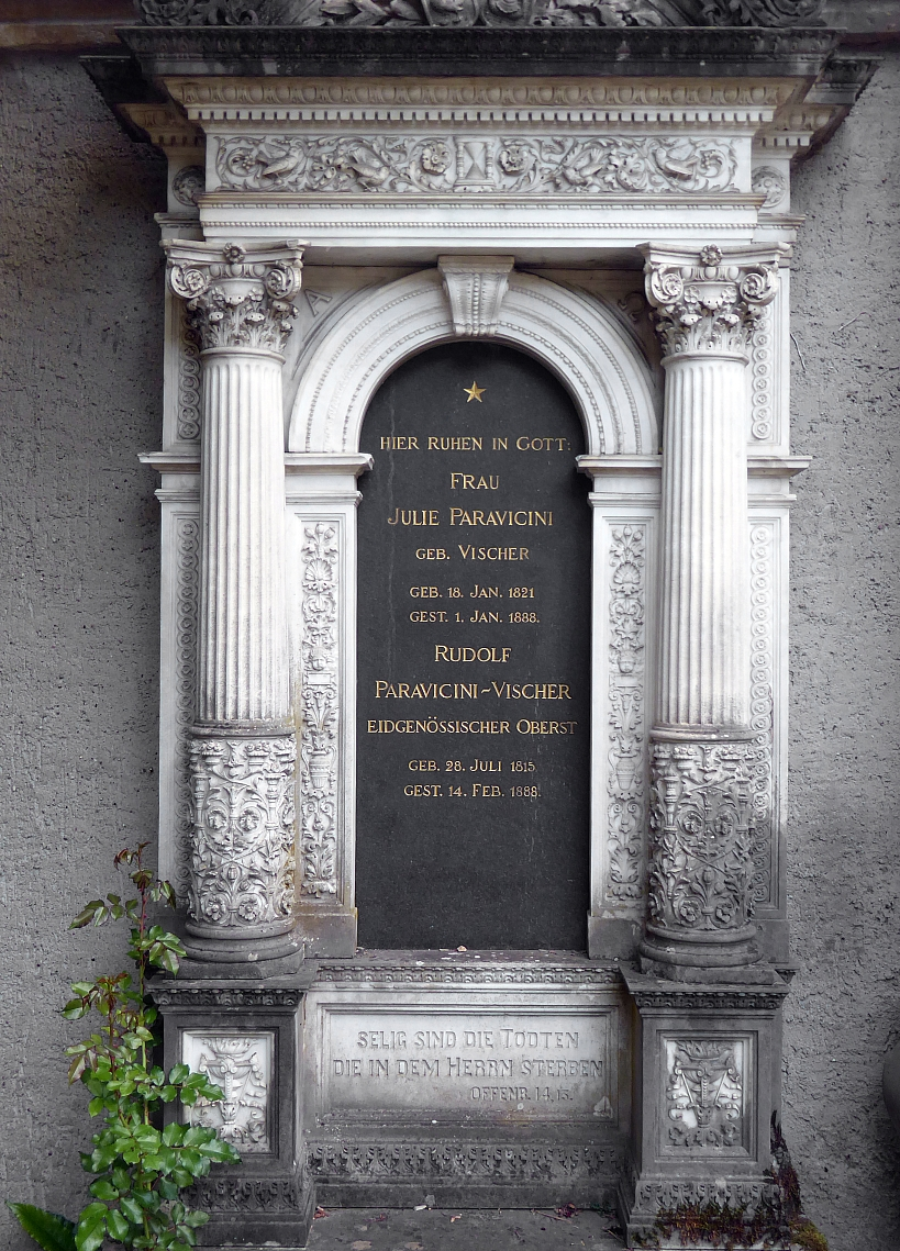 Rudolf Paravicini-Vischer (1815-1888) Unternehmer, Politiker, Offizier. Grab auf dem Friedhof Wolfgottesacker, Basel